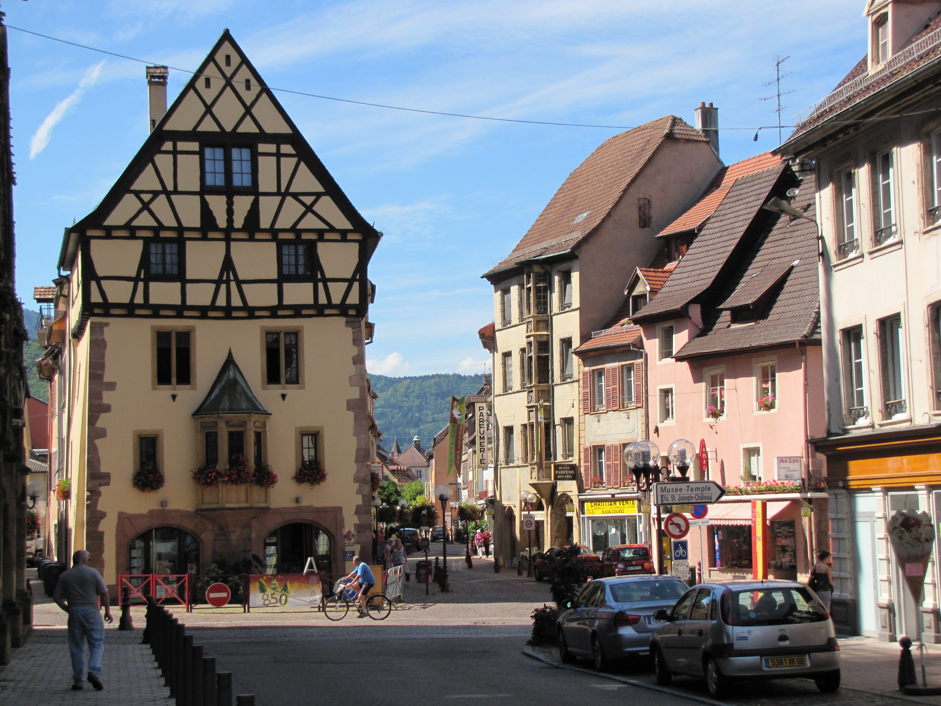 Alsace, Haut-Rhin, Thann, Maison Ehrhard (XVIe-XXe), 7 rue de la Première Armée}. It is indexed in the Base Mérimée, a database of architectural heritage maintained by the French Ministry of Culture, under the references PA00085702 and IA00024232.